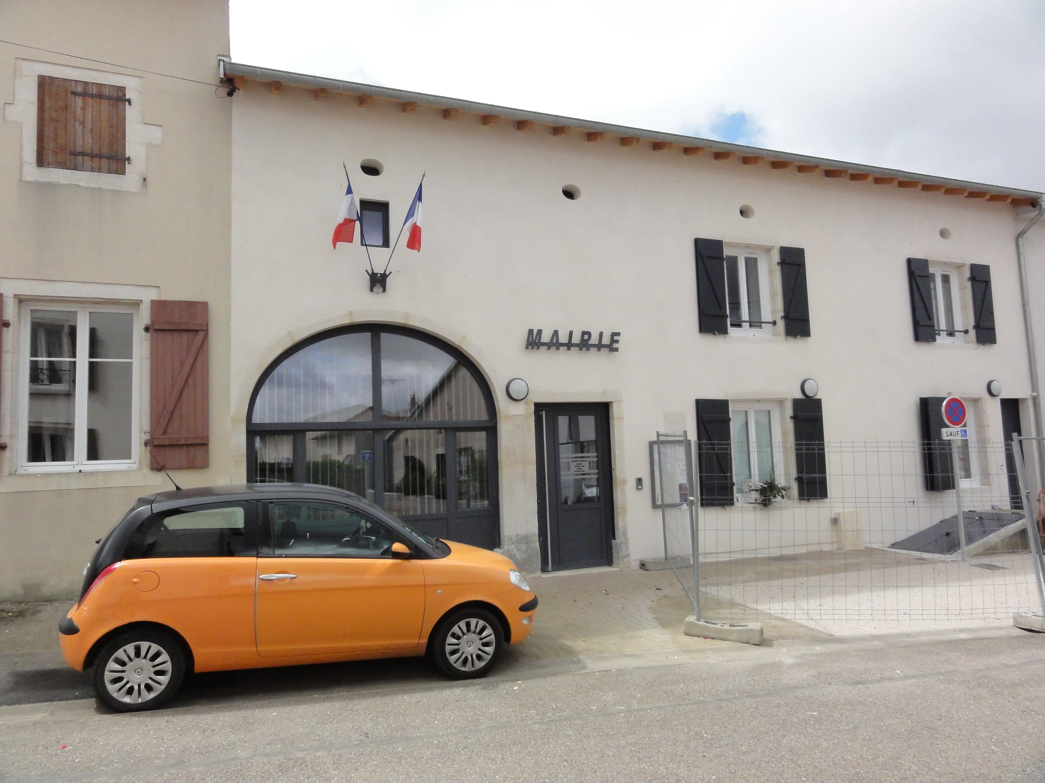 Saint-Remimont (M-et-M) mairie